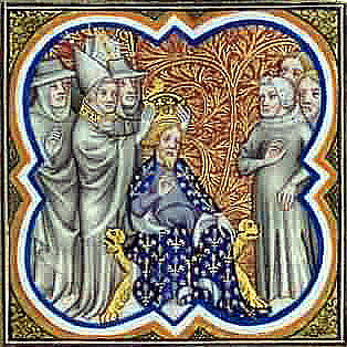 Krönung Karls des Großen in der Grandes Chroniques de France, Exemplar des französischen König Karls des V..